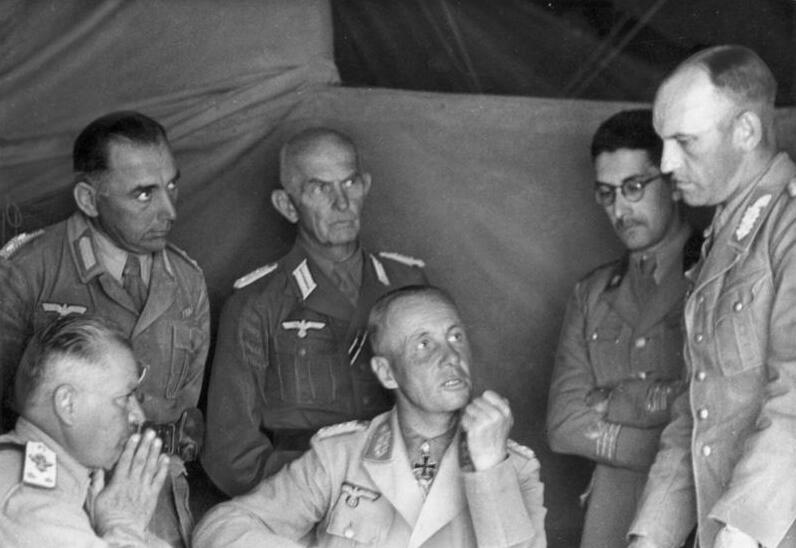 Prop.-Kp. PZ, Afrika Film-Nr.: 73/39 Bildberichter: Moosmüller Ort: Afrika Datum 21.11.41 General [Erwin] Rommel im Hauptquartier des ital. Armeekorps. Kartenbesprechung mit dem ital. Armeegeneral [Enea] Navarini u. dem Verbindungsoffizier Oberst Diesener